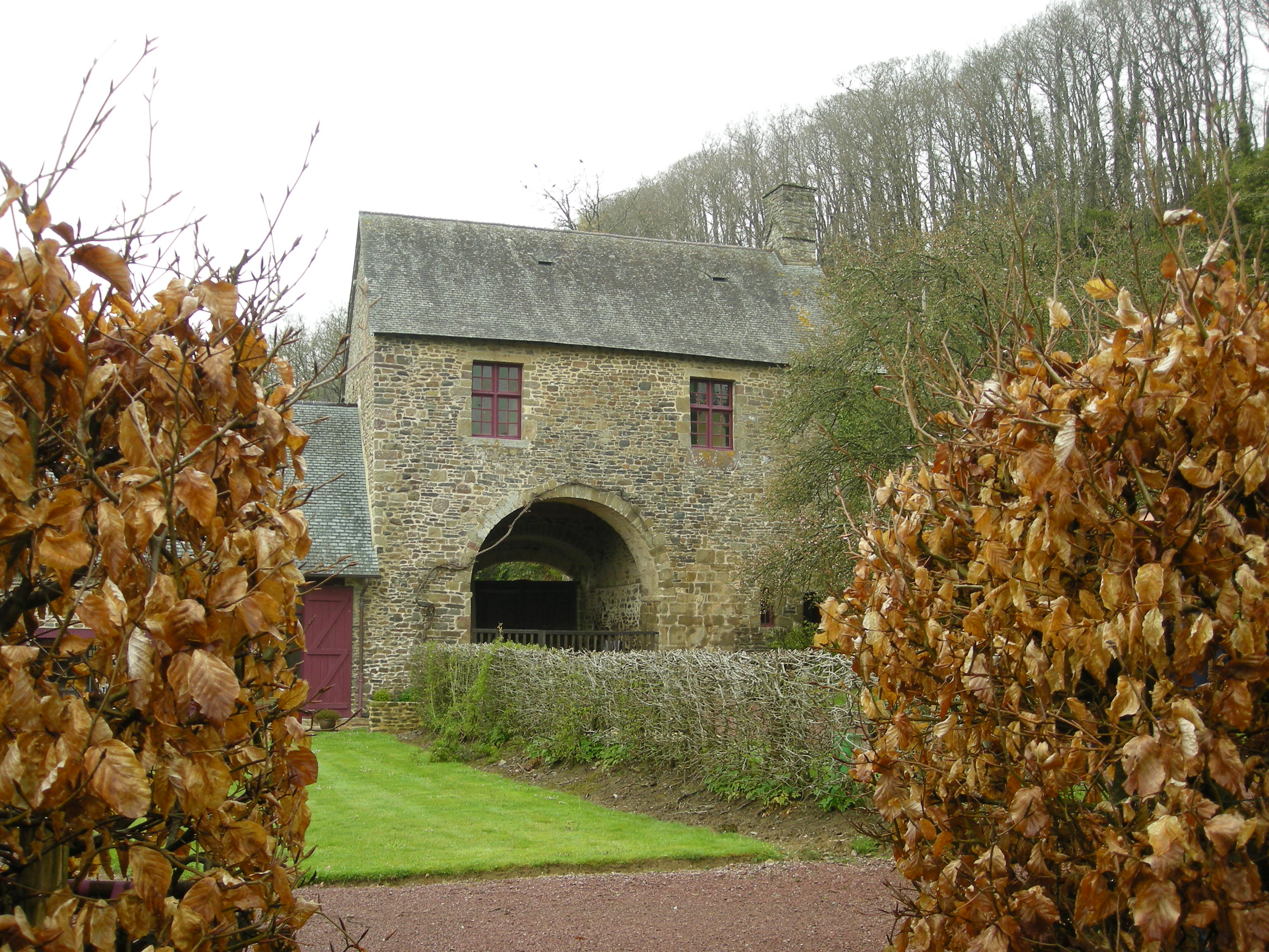 La porterie (côté interne) de l'abbaye de Hambye (Normandie)